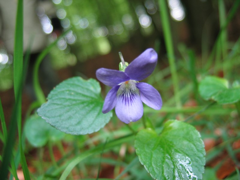 Hain-Veilchen mit schneeweißem Sporn Viola riviniana, Nähe Binz auf Rügen